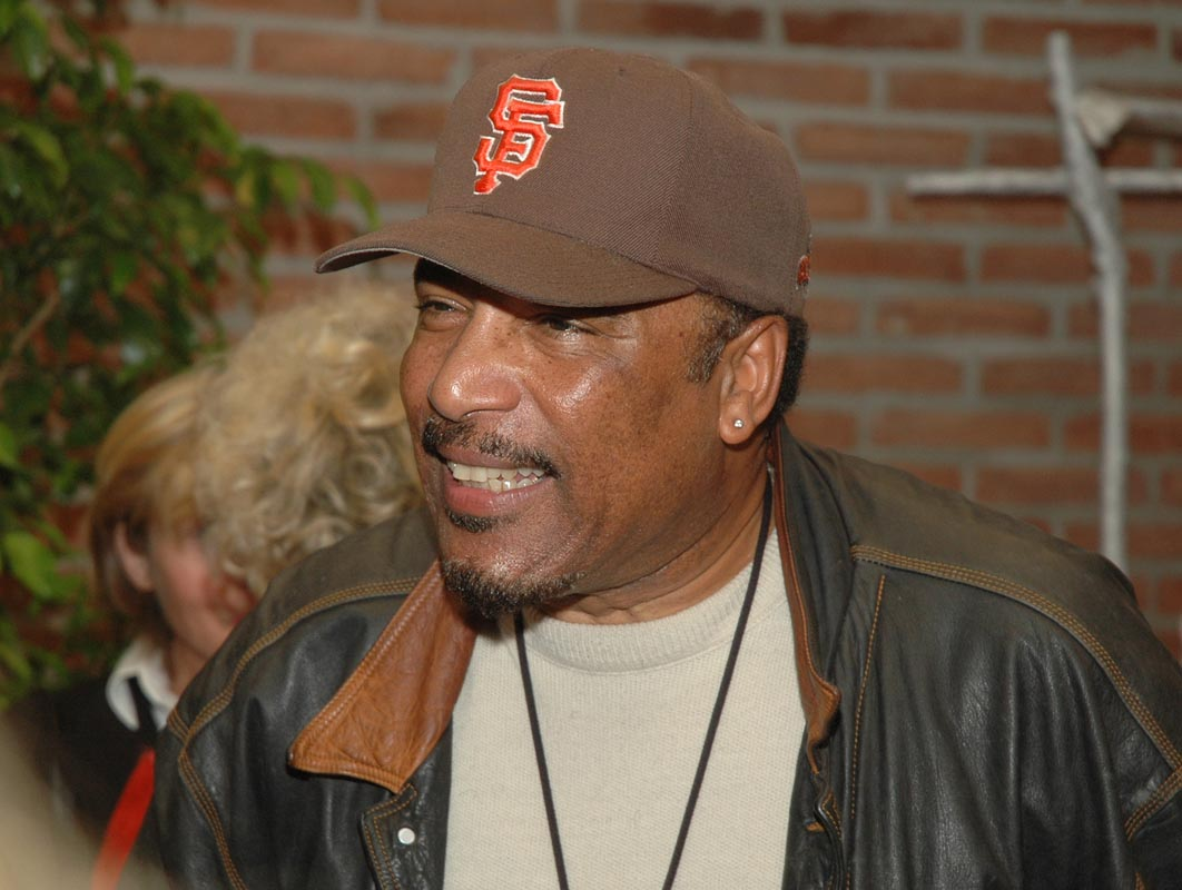 Ron Williams beim Künstlerempfang 2005 im Gasteig, München. Eingeladen hatte der OB UDE